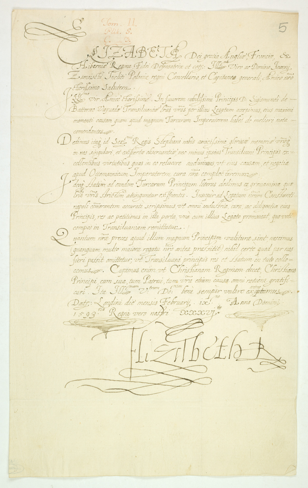 List Elżbiety I, królowej angielskiej, do Jana Zamoyskiego, kanclerza i hetmana wielkiego koronnego, z zapewnieniem, że zgodnie z jego prośbą dyplomata angielski będzie popierał u sułtana tureckiego sprawę Zygmunta Batorego, księcia siedmiogrodzkiego. List napisany 9 lutego 1593 roku w Londynie, zawiera pieczęć królewską, spisany w języku łacińskim na karcie papierowej.